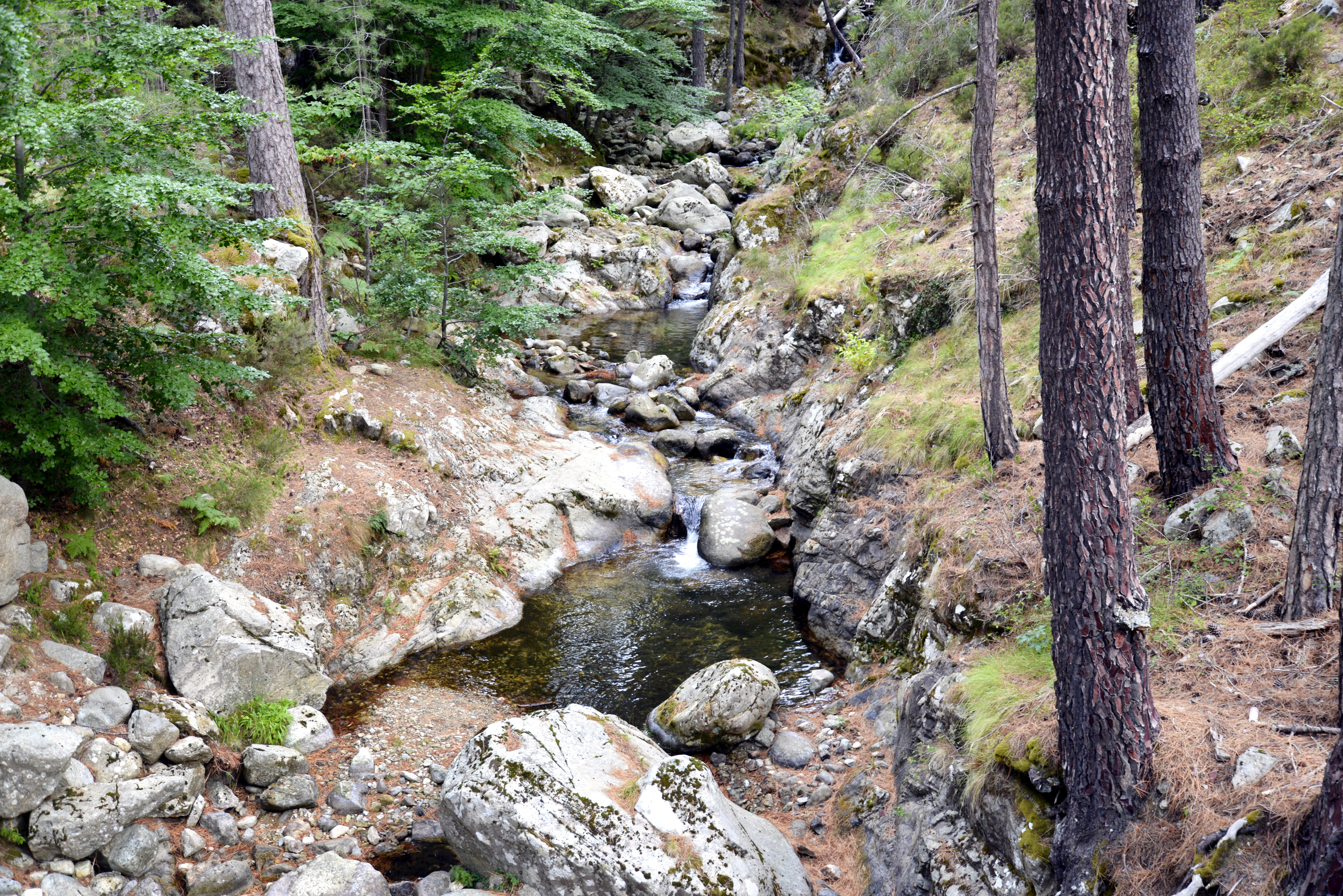 Ghisoni, Fiumorbo (Haute-Corse) - Dans la forêt de Canali, le ruisseau d'Alzitone (ou de Regolo) en amont du pont de Canali sur la route D69.